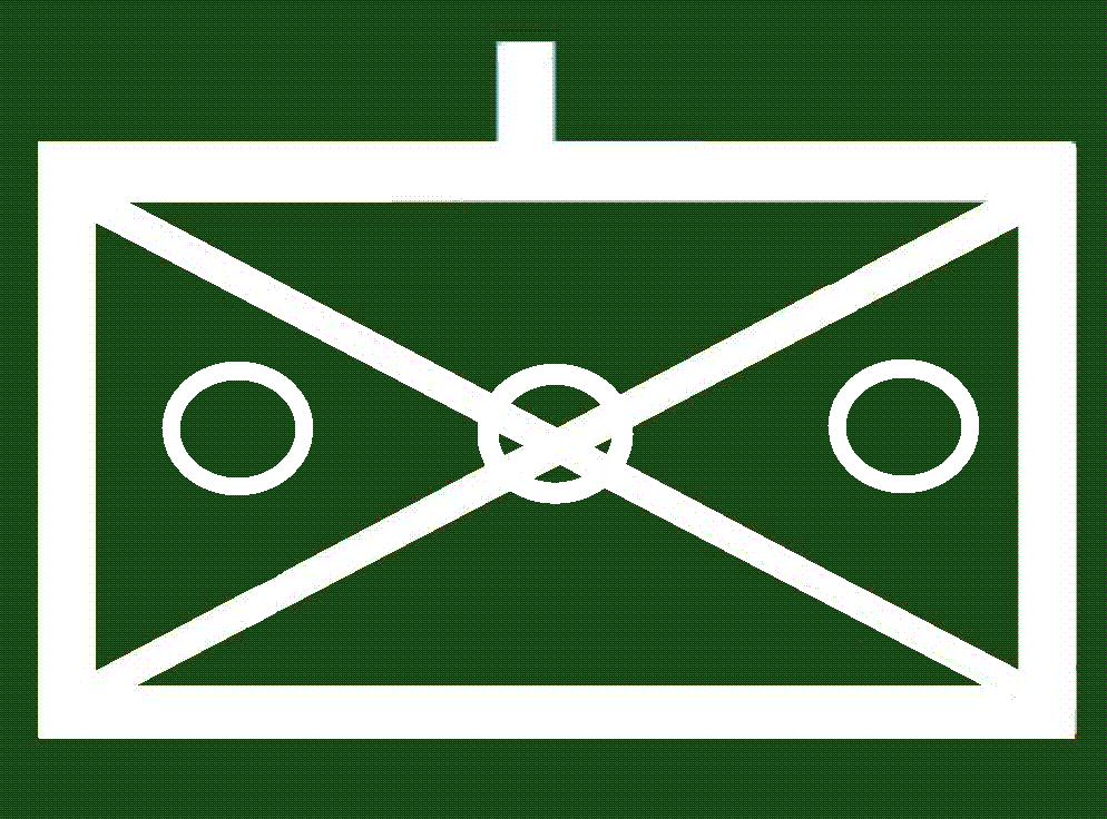 Taktisches Zeichen Jägerbataillon (mot) der Bundeswehr. Gländegängige Fahrzuege, nicht hü